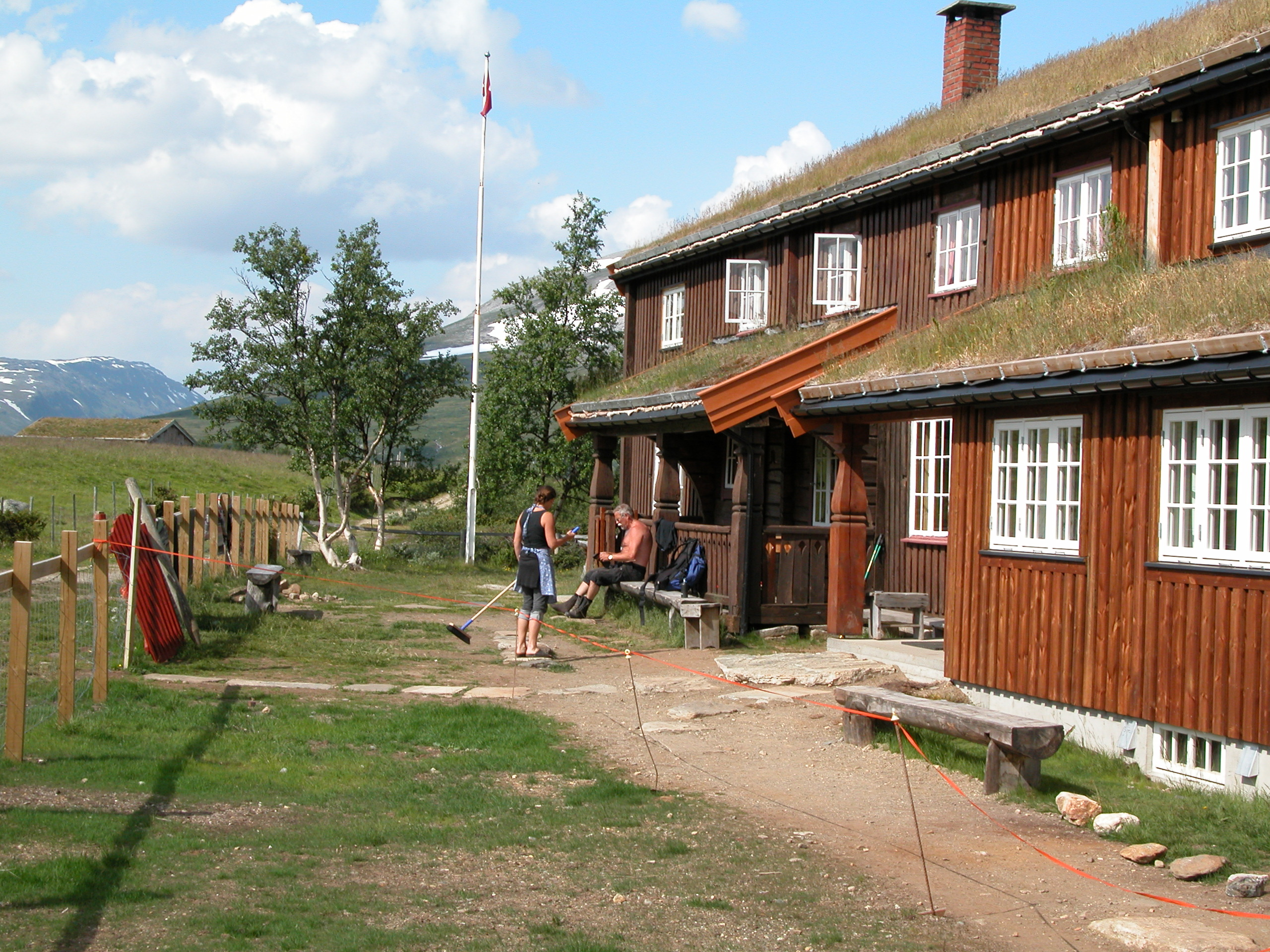 Jøldalshytta i Trollheimen i Sør-Trøndelag.